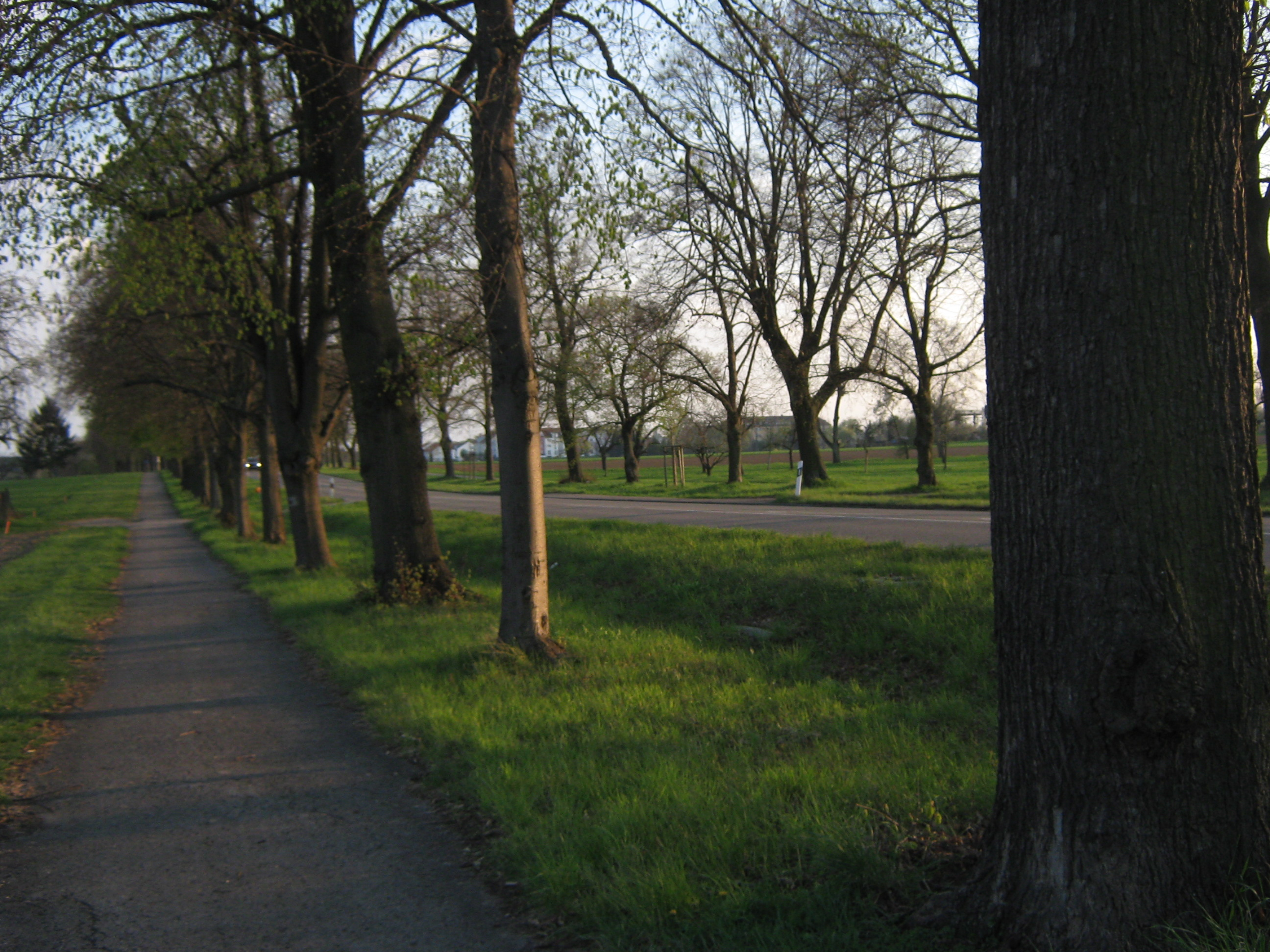 Das flächenhafte Naturdenkmal Lindenallee zwischen Kornwestheim und Ludwigsburg befindet sich auf etwa 1 km Länge beiderseits der L 1143. Die Unterschutzstellung geschah am 7. Juli 1998 unter der Schutzgebiets-Nr. 81180460004.